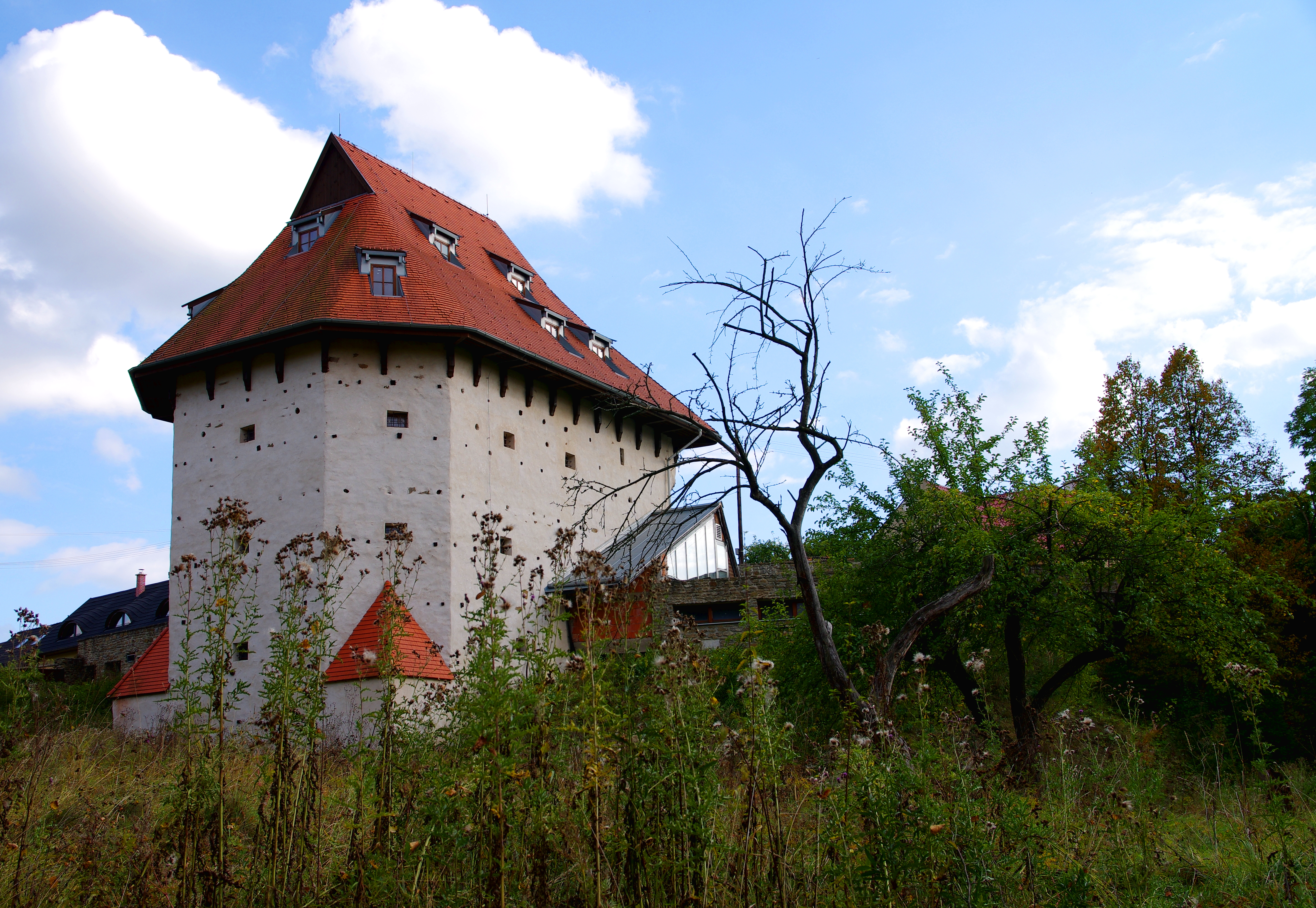 Bašta